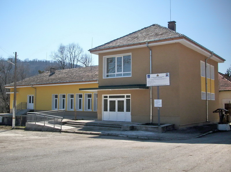 Ремонтираната и обновена сграда на Народно читалище "Светлина" по проект, финансиран от ЕС